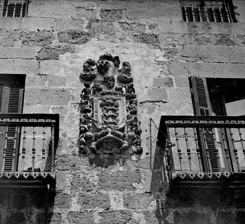 Escudo de la familia Unzueta. Muy arraigado en Eibar.